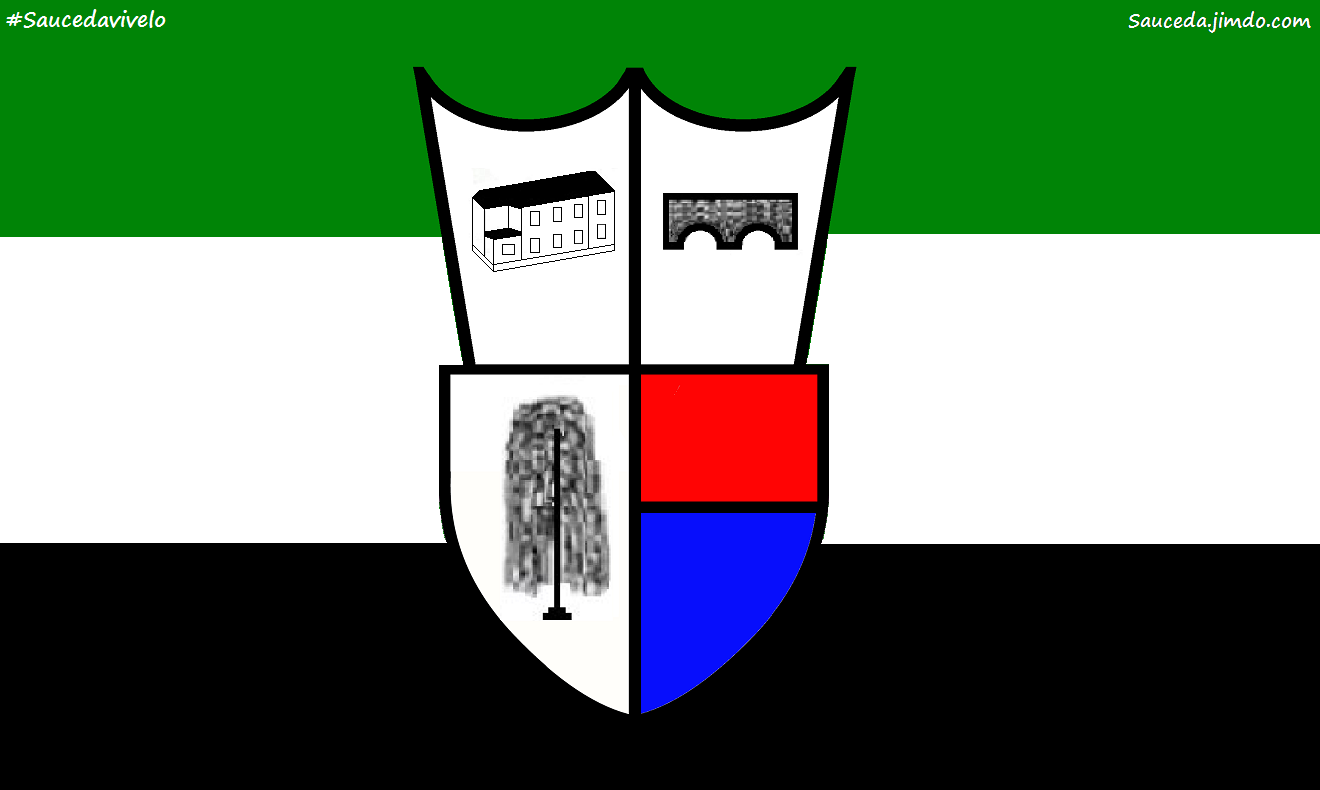 Bandera de Sauceda